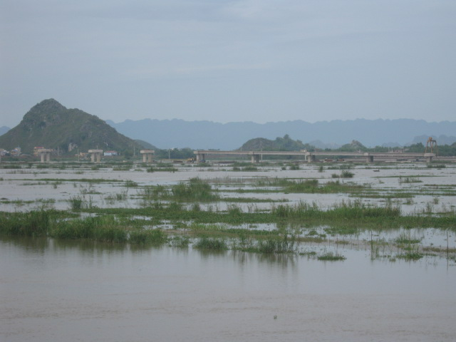 Cầu Trường Yên bắc qua sông Hoàng Long nối Hoa Lư và Gia Viễn, Ninh Bình